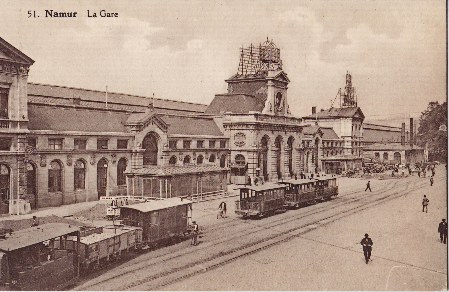 Carte postale ancienne éditée par les Editions Belges :Namur - La Gare